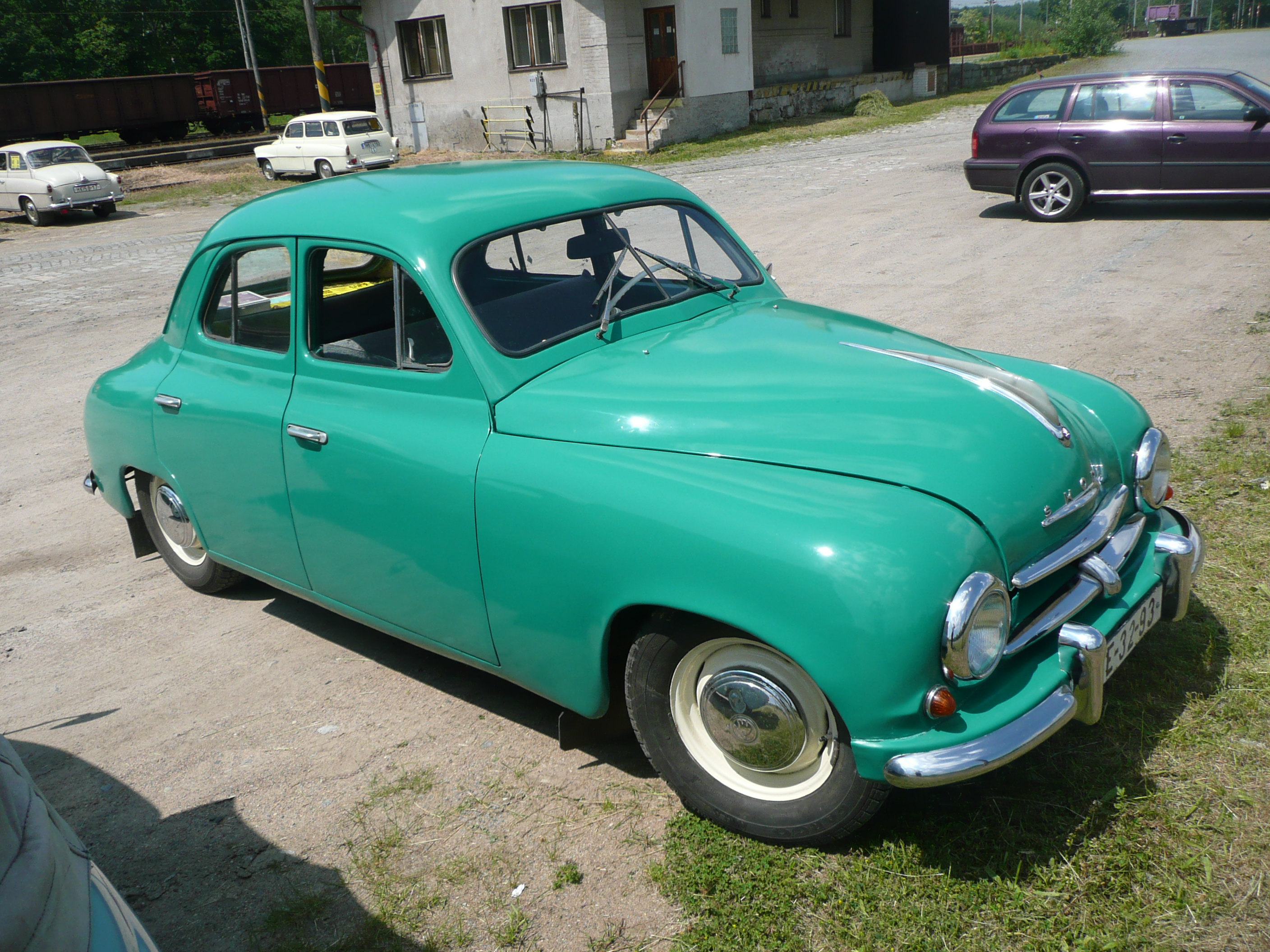 Skoda 1201 bei einer Ausstellung im Bahnhof Pardubice